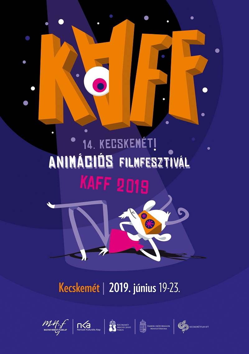 A 2019-es Kecskeméti Animációs Filmfesztivál hivatalos plakátja